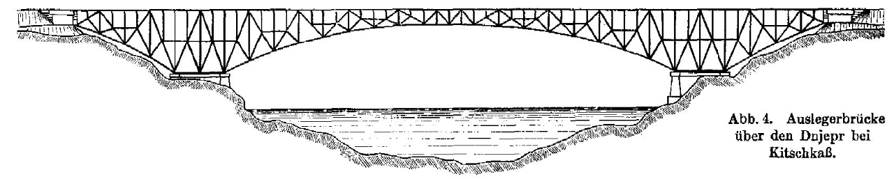 Схема Кичкасского моста из статьи "Neuere bemerkenswerte Brückenbauten in Russland" в журнале "Zentralblatt der Bauverwaltung"